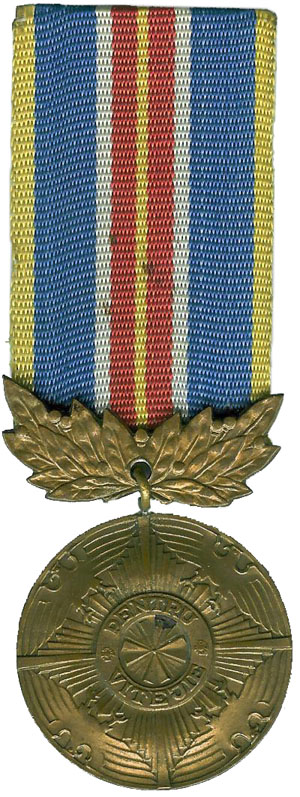 Медаль Республики Молдова «Pentru Vitejie»